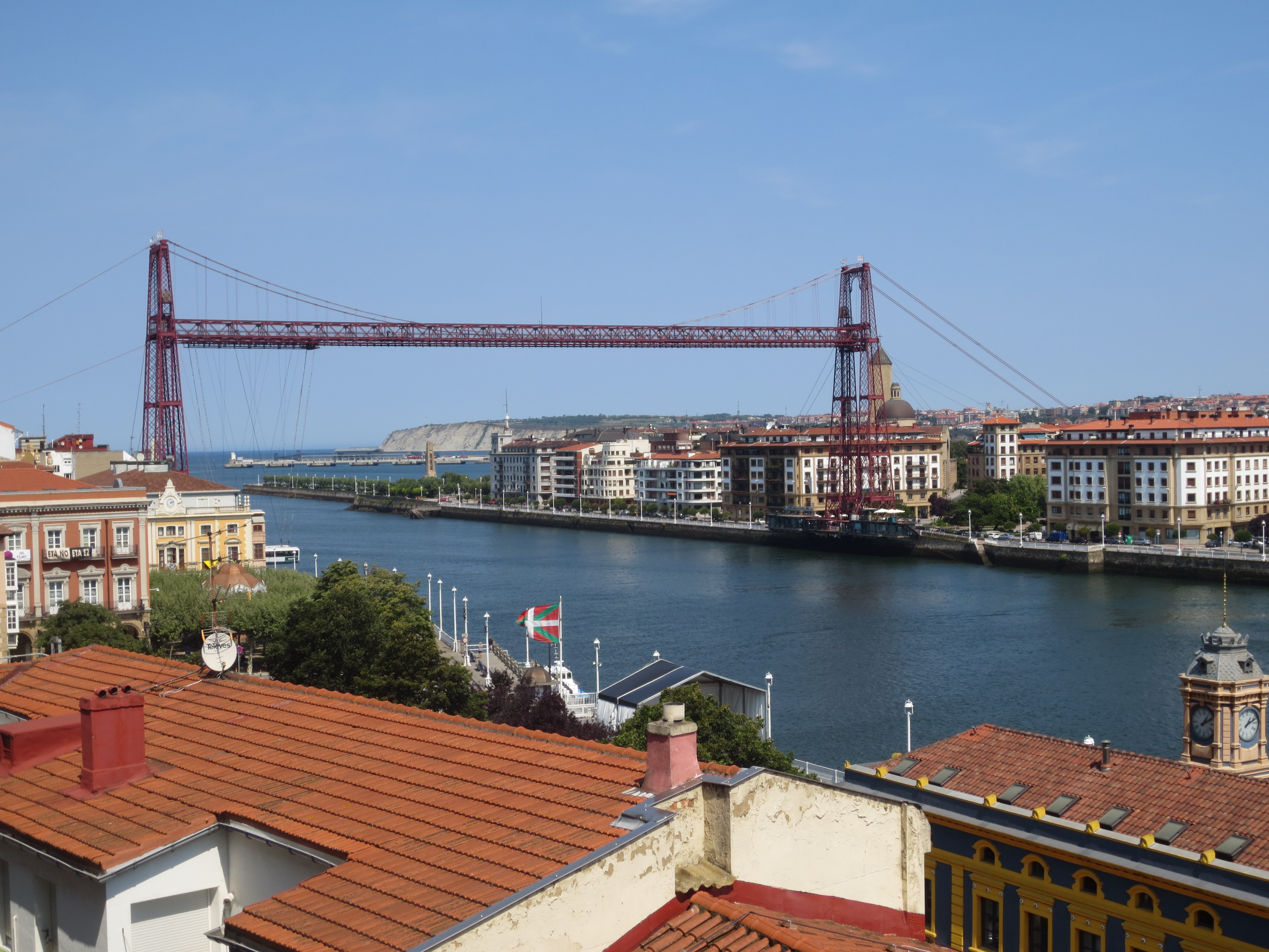 Bizkaia zubia Andra Mari elizatik.